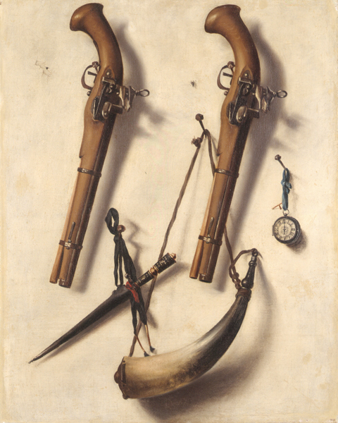 La obra representa diversos objetos de caza y armas blancas y de fuego.